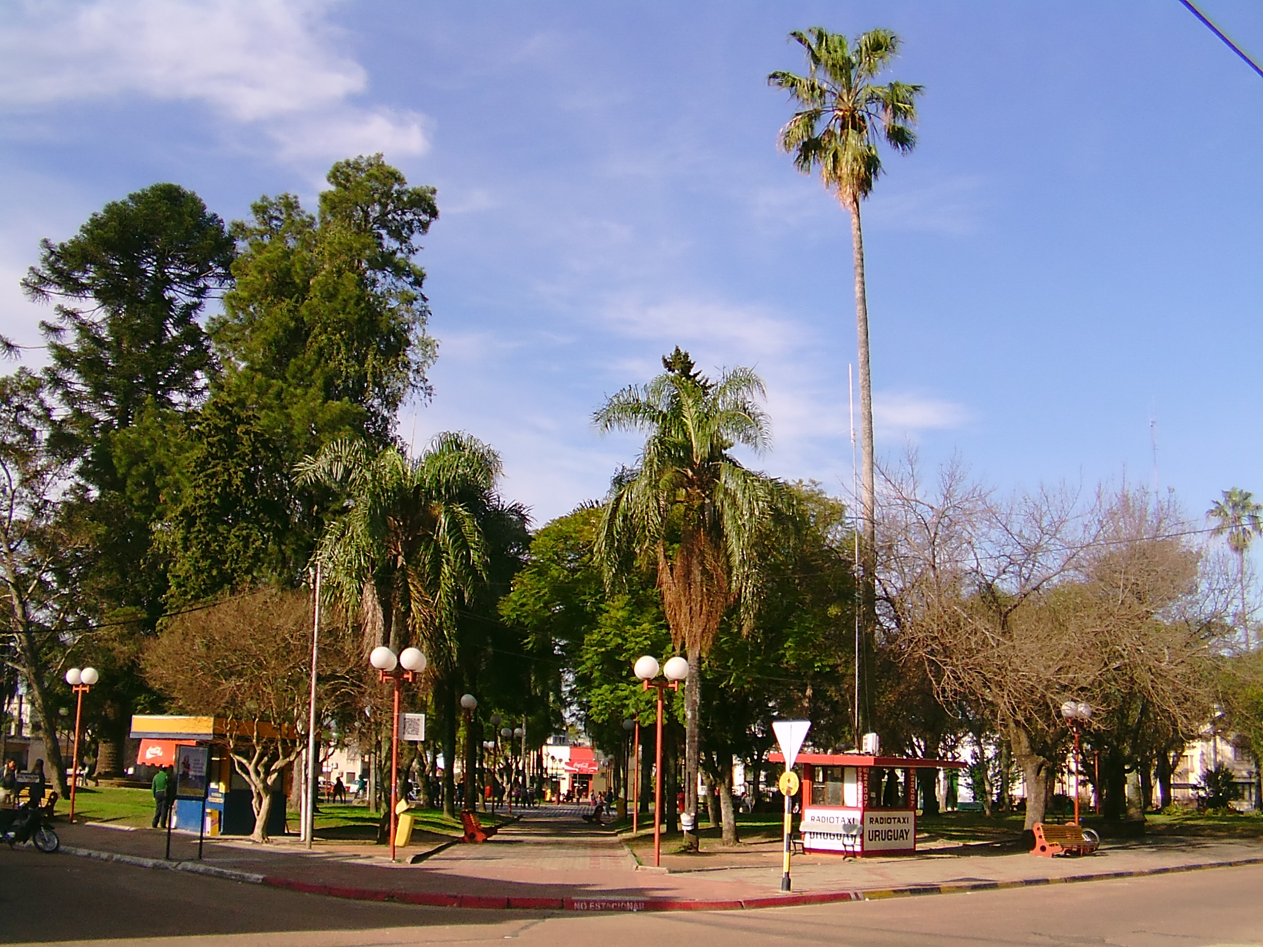 Plaza 19 de Abril (Tacuarembó)